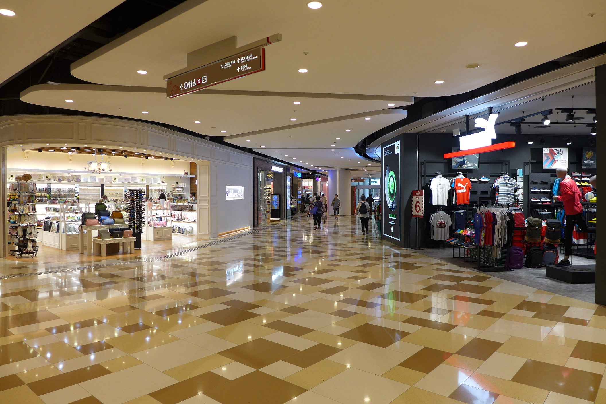 Temple Mall Interior L2 view